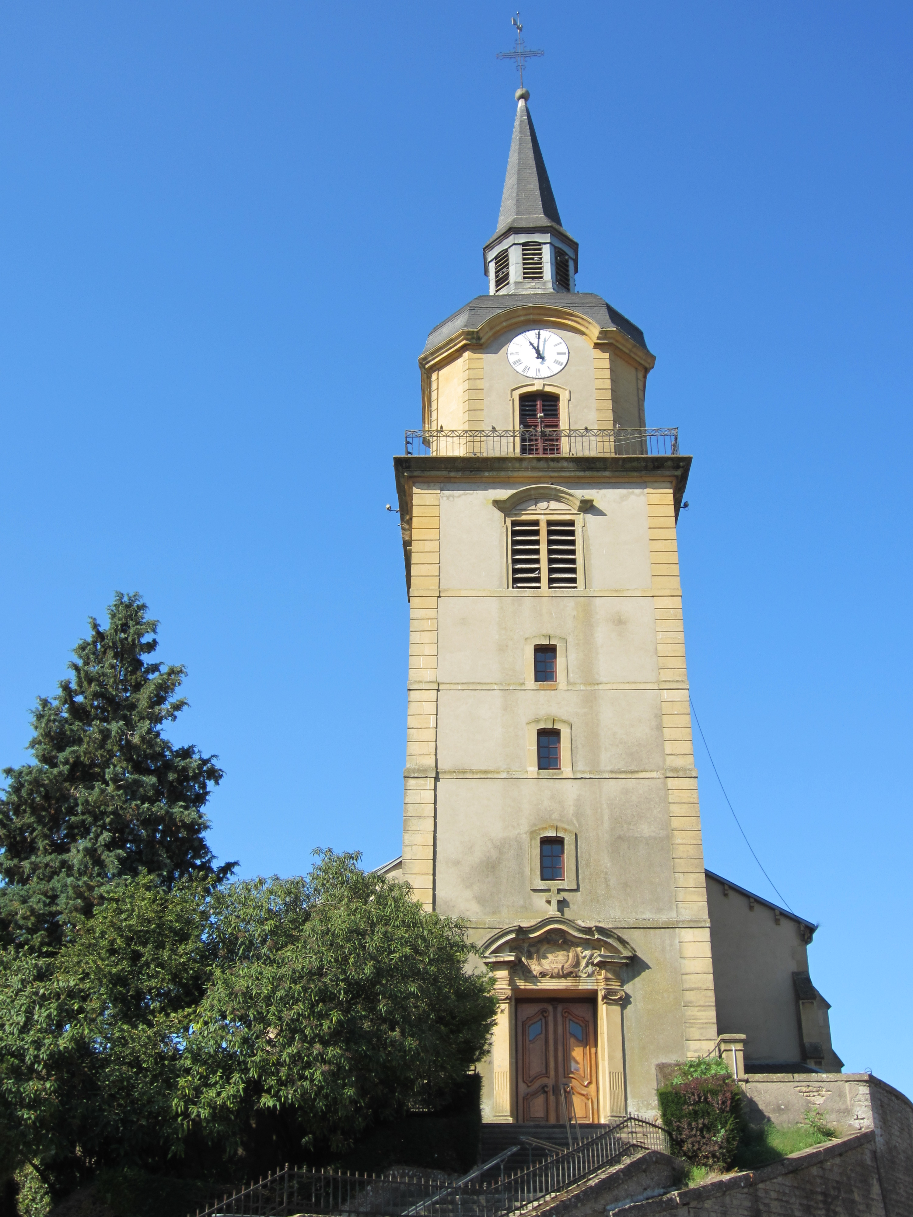 Description eglise saint pierre fontoy Date3 September 2011Sourcemon appareil photoAuthorAimelaimePermission (Reusing this file) eglise saint pierre fontoy